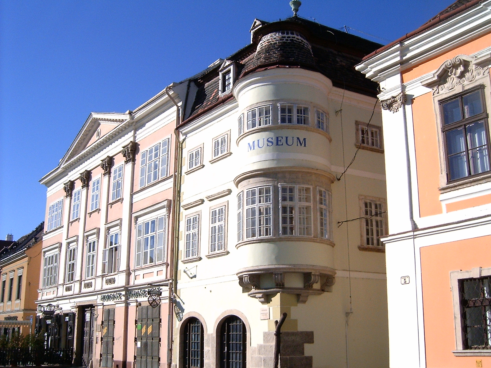 A győri vastuskós ház a Széchenyi téren (Győr-Moson-Sopron megye)